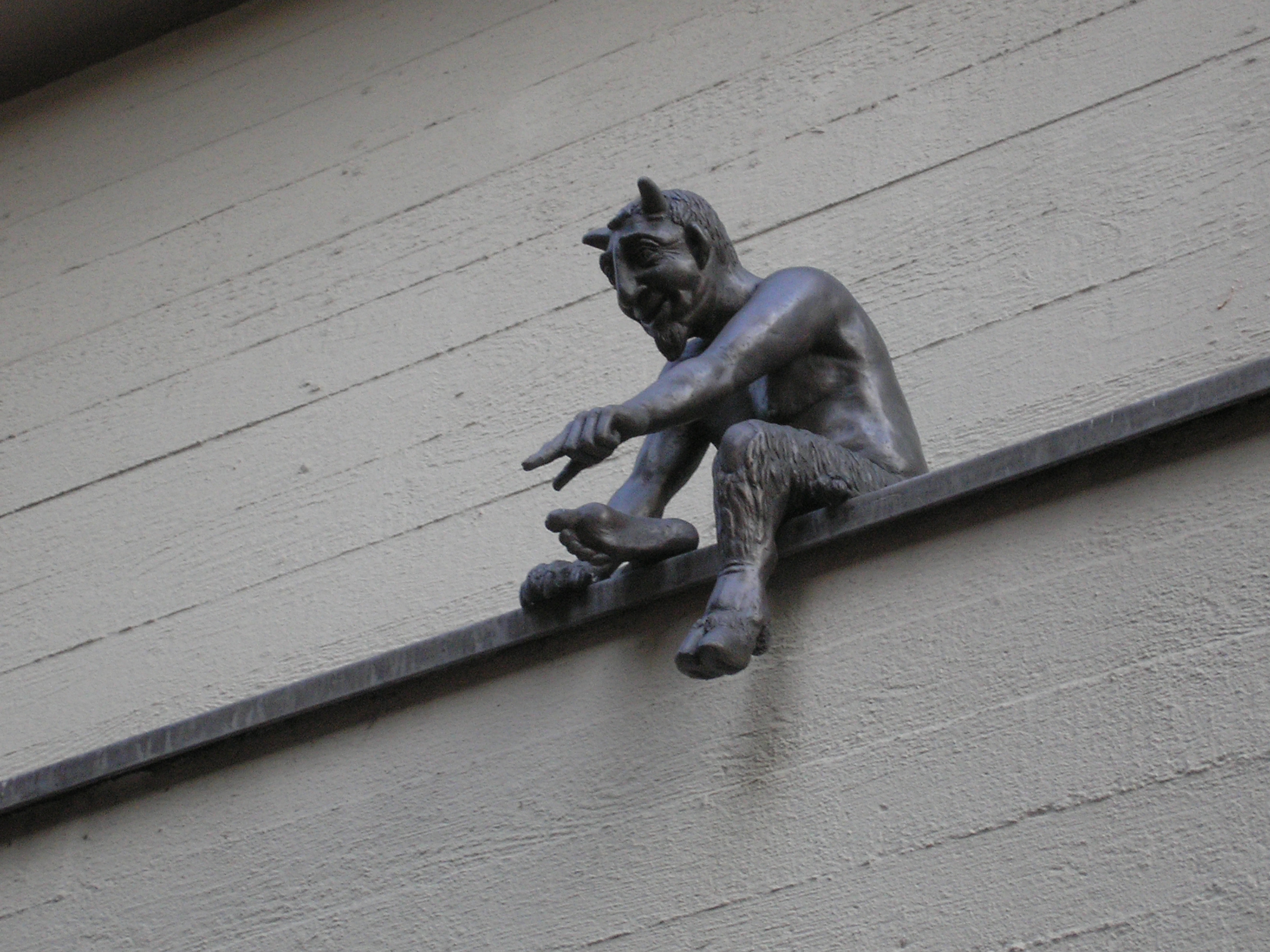 Skulptur "Teufelchen" von Ursula Schalück (2006) in der Dürener Strasse in Köln-Lindenthal.